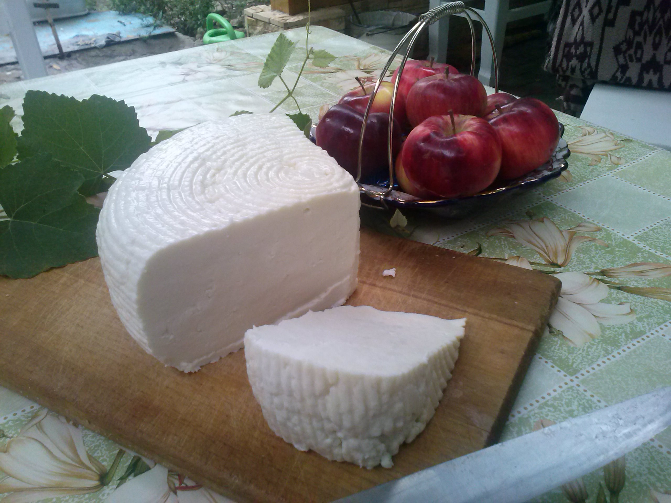 национальное блюдо адыгской кухни. Готовится из цельного овечьего, козьего, чаще коровьего молока.